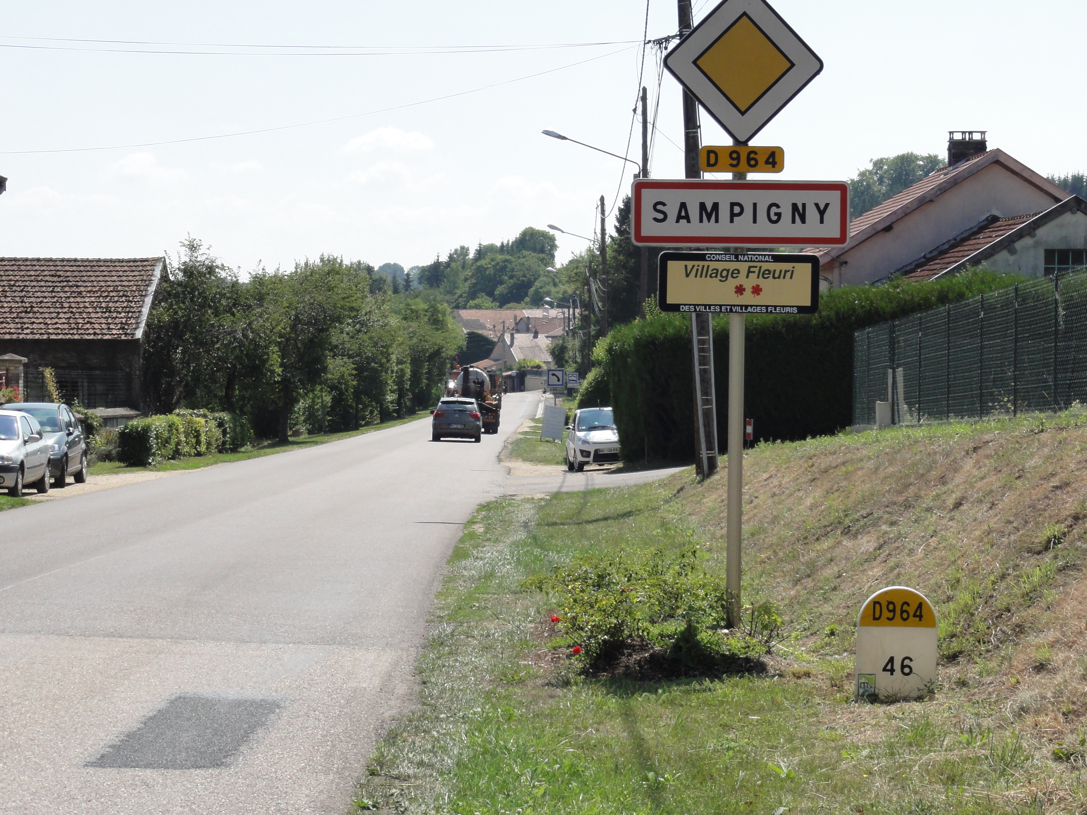 Sampigny (Meuse) city limit sign